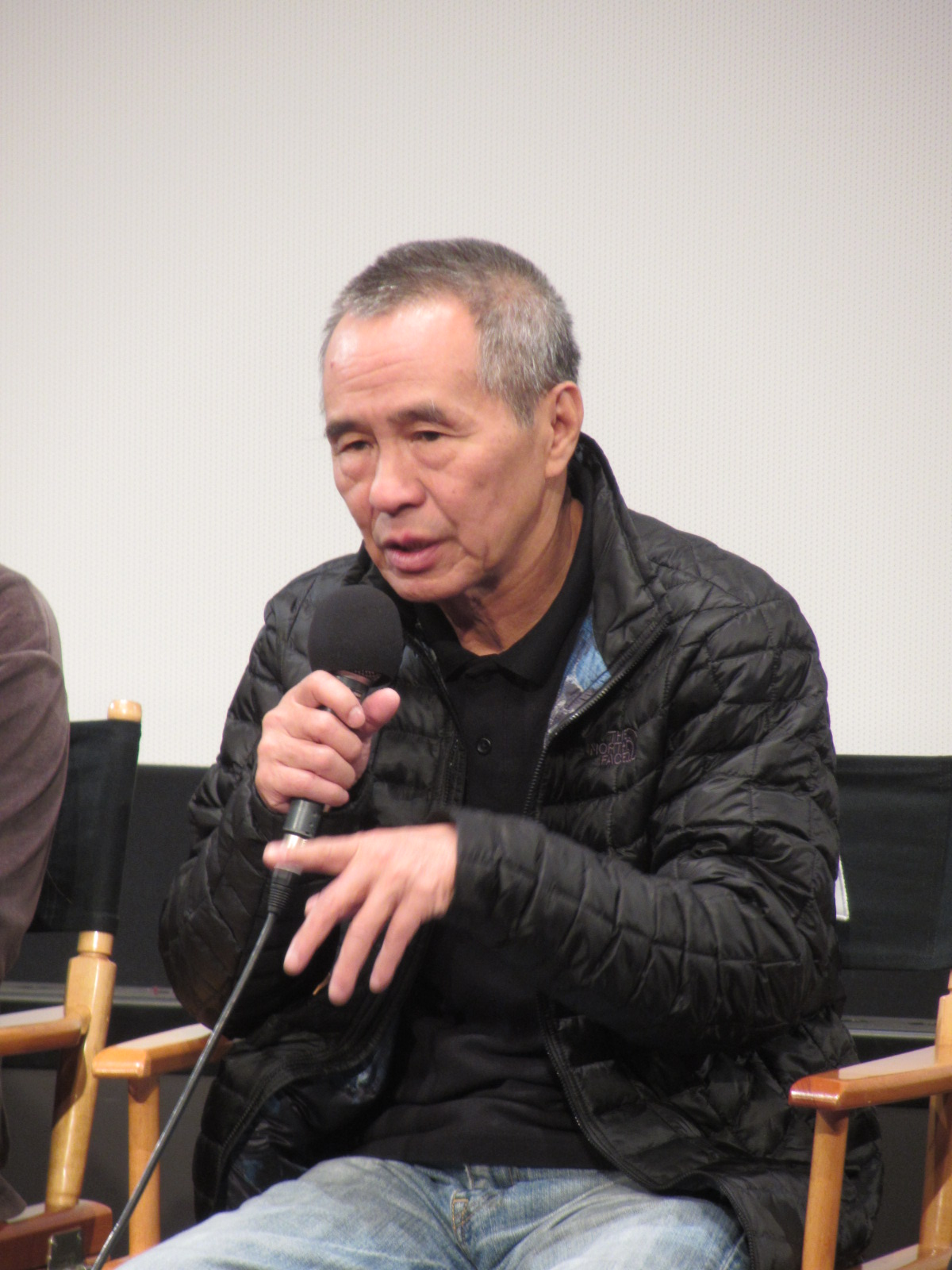 Hou Hsiao-hsien à l'avant-première de "The Assassin" à la cinémathèque française